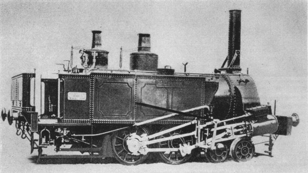 Dampflokomotive Sächsische H VIIIb T.